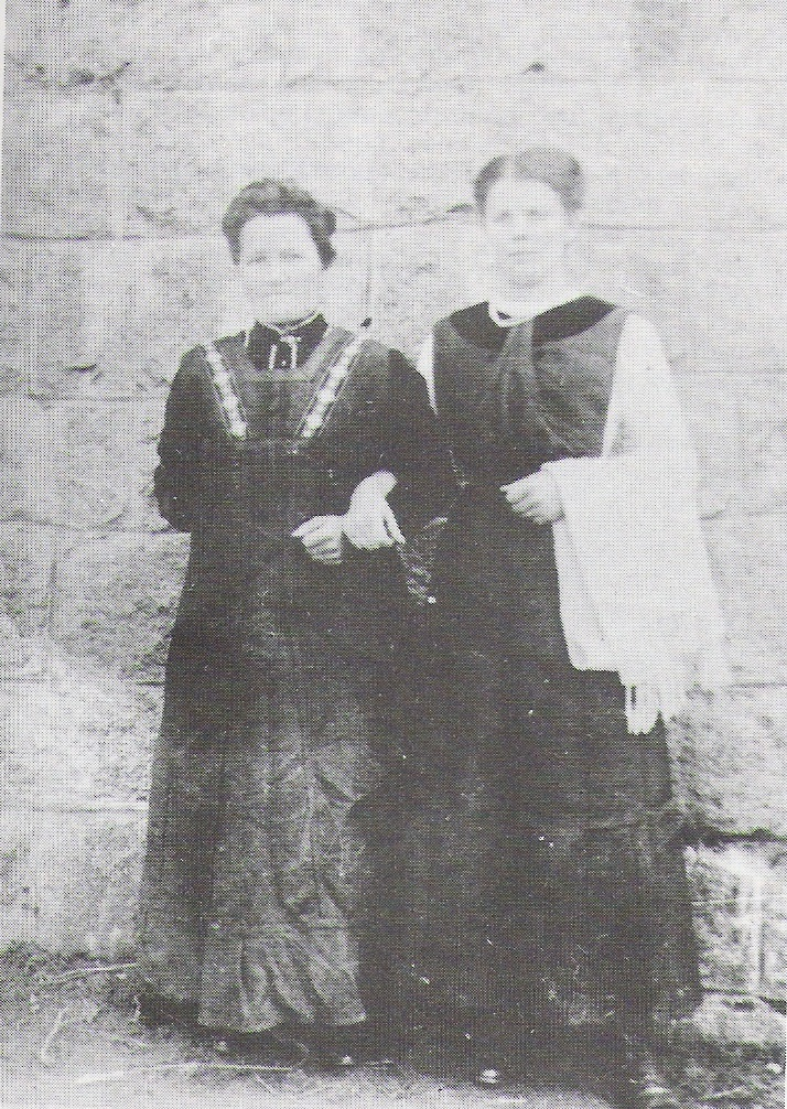 Festtagskleidung im Steinwald - Clothing on holidays in Steinwald - Des vêtements pour des jours de fêtes dans le Steinwald